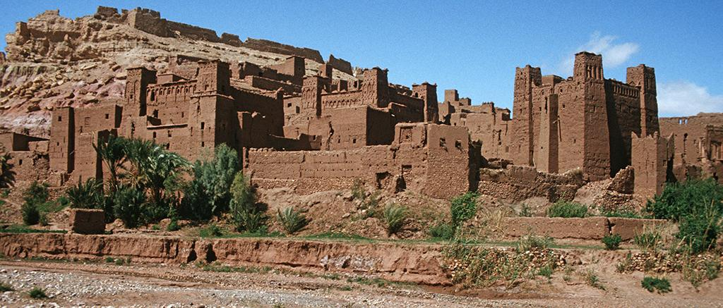 Aït Benhaddou, Kashba bei dem Dadestal